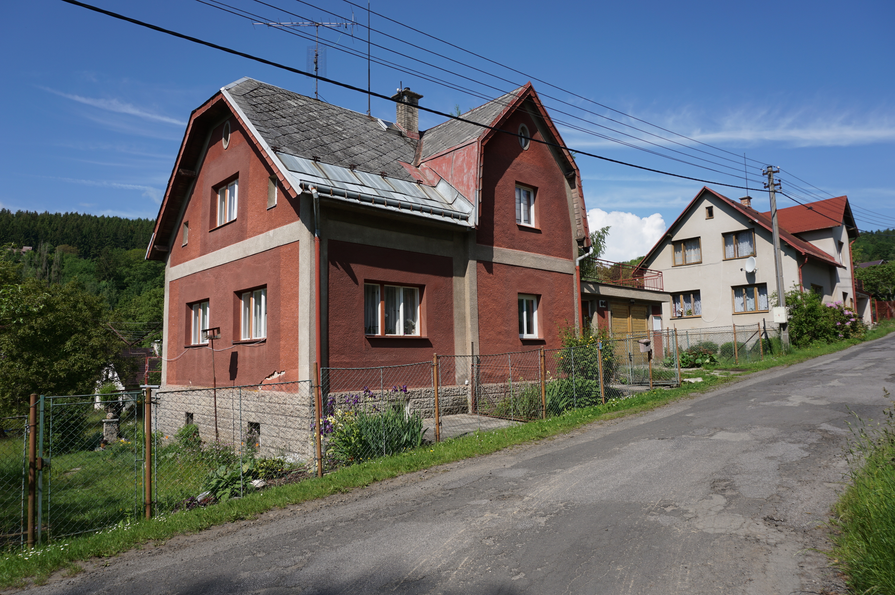 Mukařov (u Jablonce nad Nisou) - čp. 94 a 79